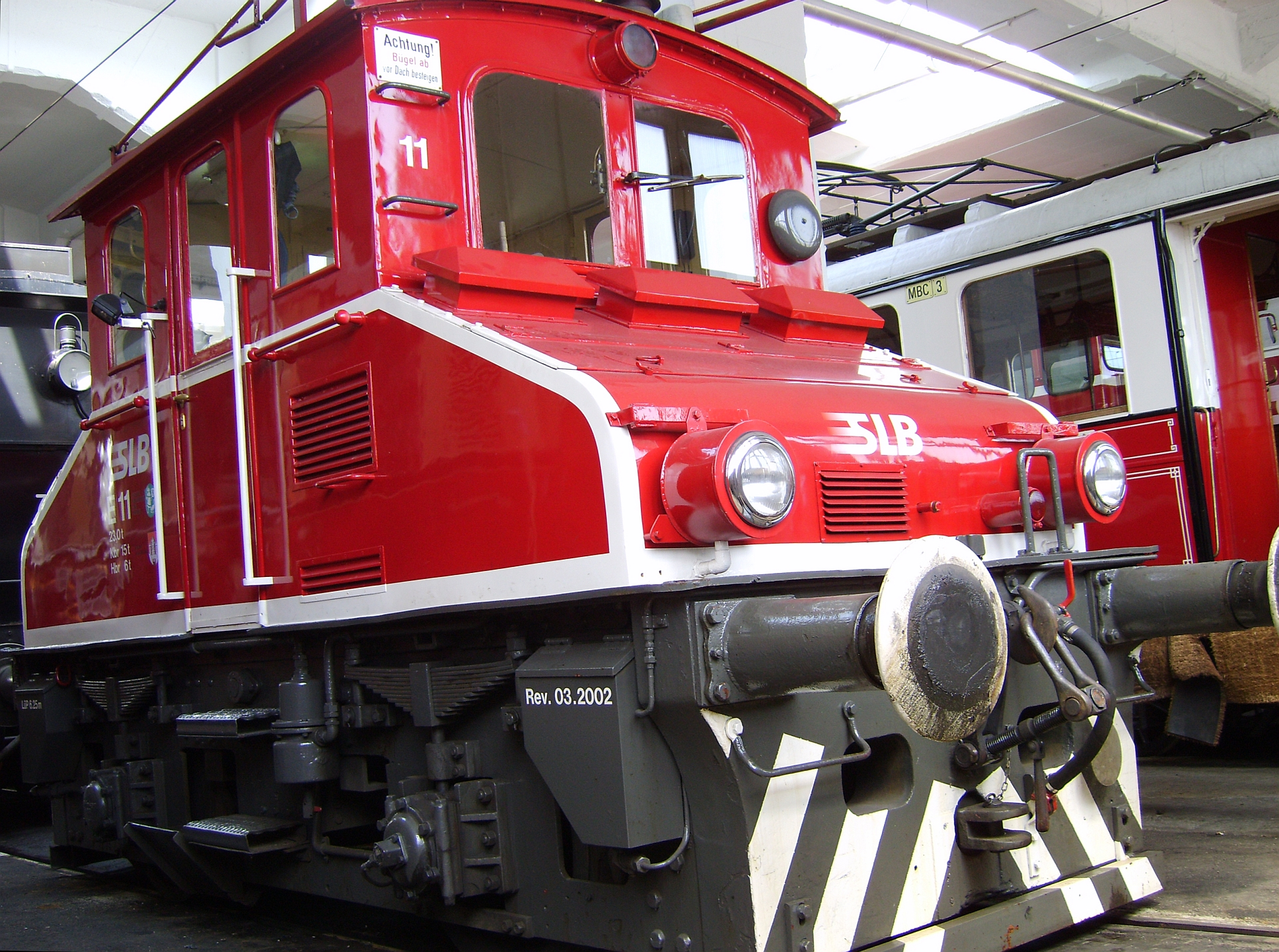 SLB 11 (AEG 1570/1913), Salzburg/Itzling, 01.05.2006, ex BSM 14